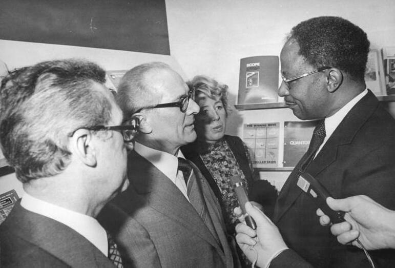 ADN-ZB Link-12.3.78-eng-Leipzig: Frühjahrsmesse 78-Rundgang- Beim Messerundgang wurden Erich Honecker und die weiteren Mitglieder der Partei- und Staatsführung der DDR am Informatinsstand der USA vom Botschafter der USA in der DDR, David Bolen (r) begrüßt.